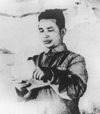 1949年4月，粟裕宣布渡江作战命令